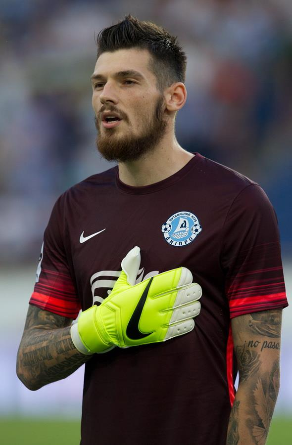 Денис Бойко - футболіст Дніпра